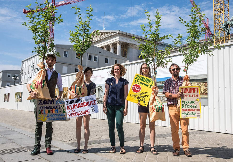 Forderungen zum österreichischen Klimavolksbegehren